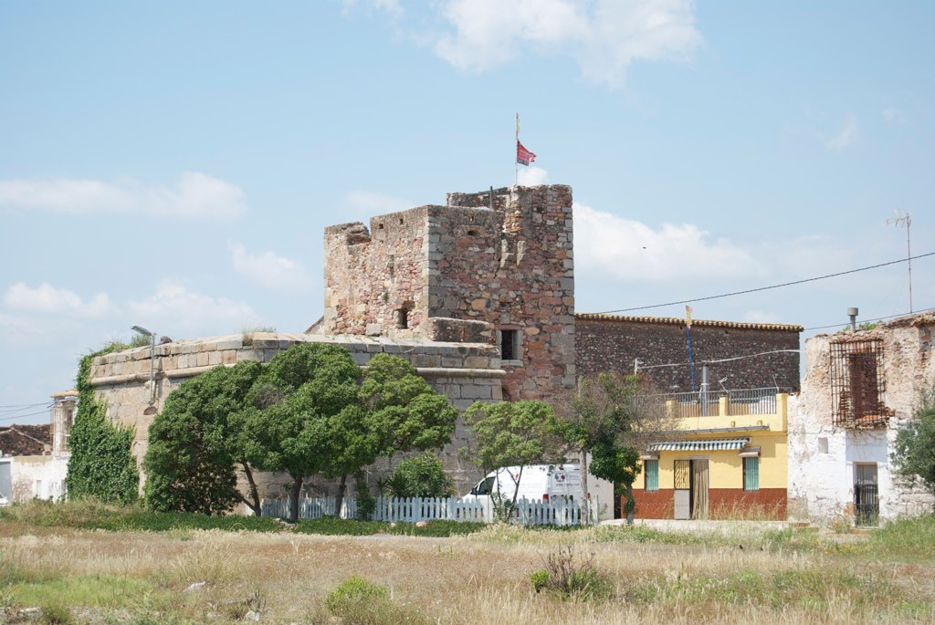 El fortín del Grau Vell de Sagunt es un gran conjunto defensivo que se inicia en el s. XV con la construcción de la torre, preparado para acciones militares, disponiendo de almacenes (edificados entre 1607 y 1771, fecha que aparece en uno de ellos), caballerizas, arsenal, etc. Pertenecía al sistema de defensa costero que defendía el Grau de Sagunt.